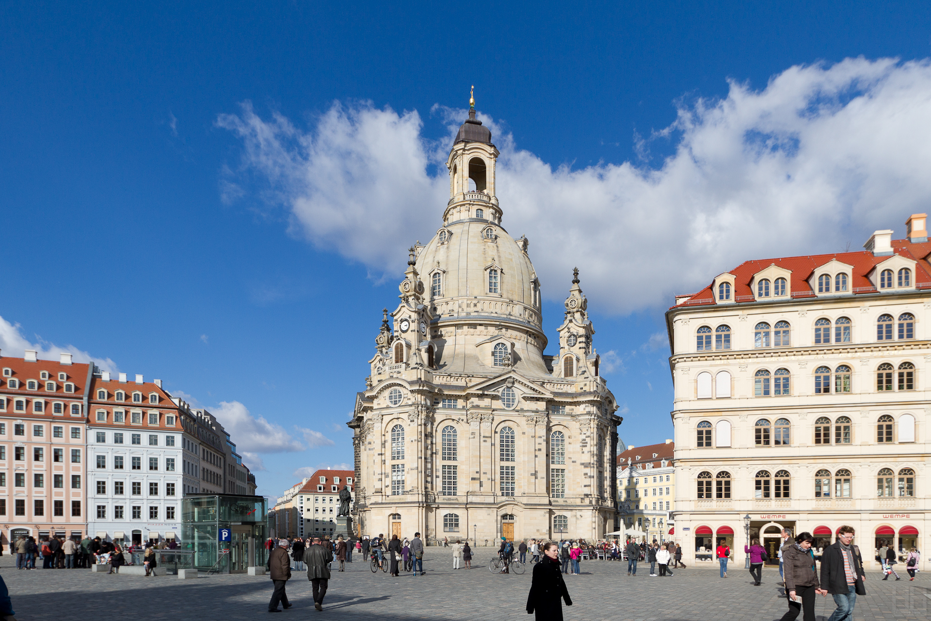 Frauenkirche